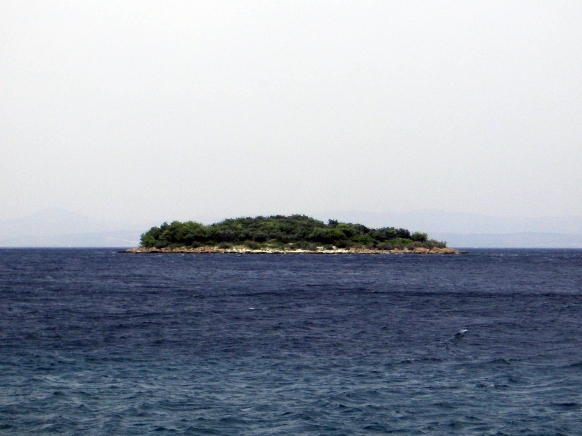 The Mrduja Island near Milna on Brač from Rt Zaglav